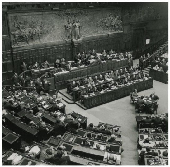 Presentazione in Aula del secondo Governo Rumor